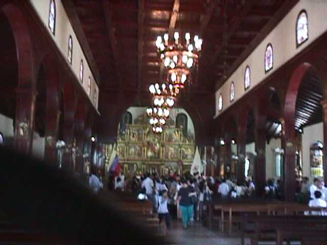 Catedral de Cumaná, estado Sucre - Venezuela (1998)